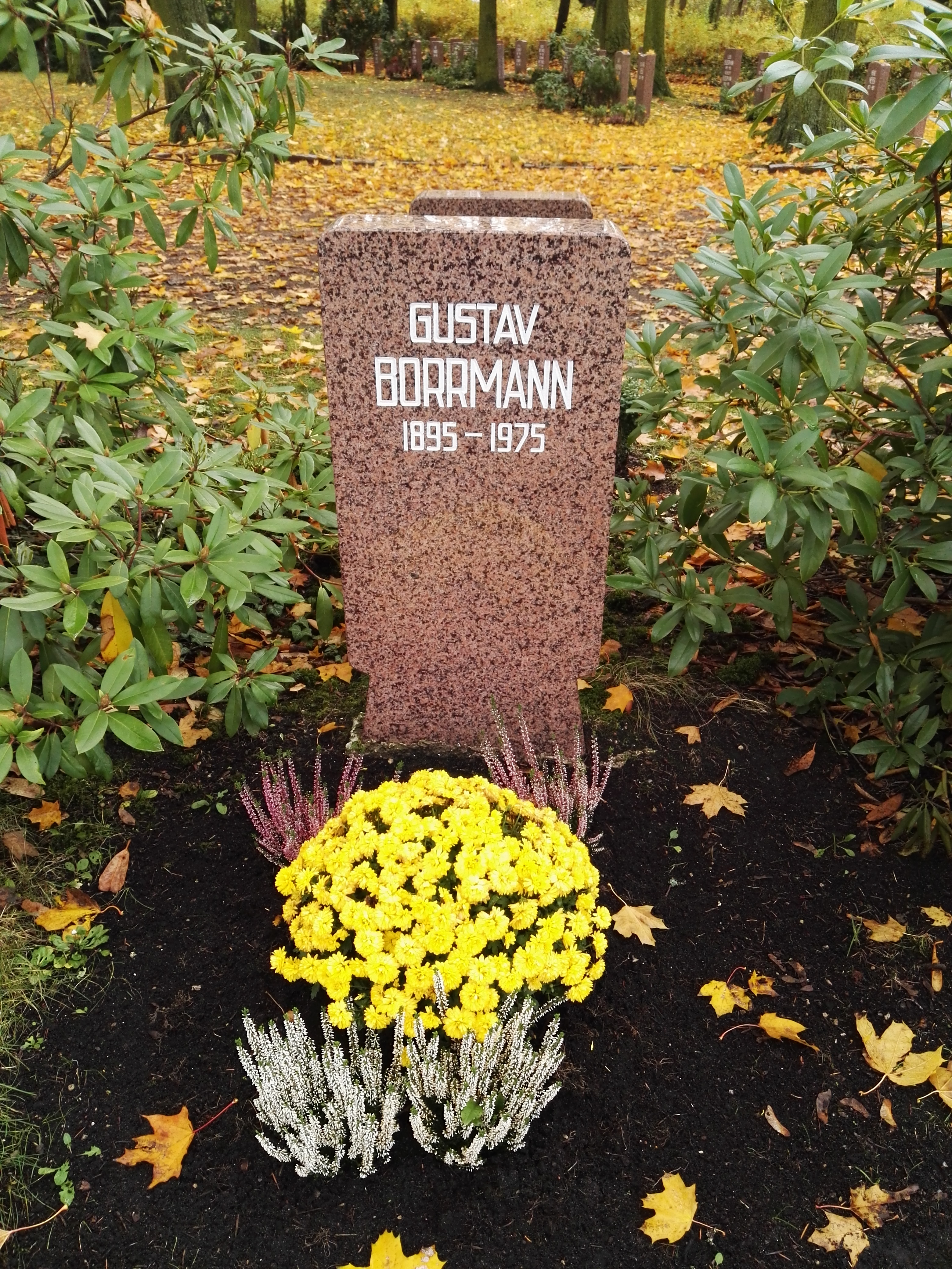 Grab von Gustav Borrmann auf dem Sozialistenfriedhof des Zentralfriedhofs Friedrichsfelde